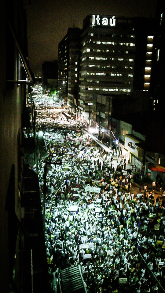 Ato Nacional Contra o Aumento de Passagens em Recife (PE) - 20/06/13